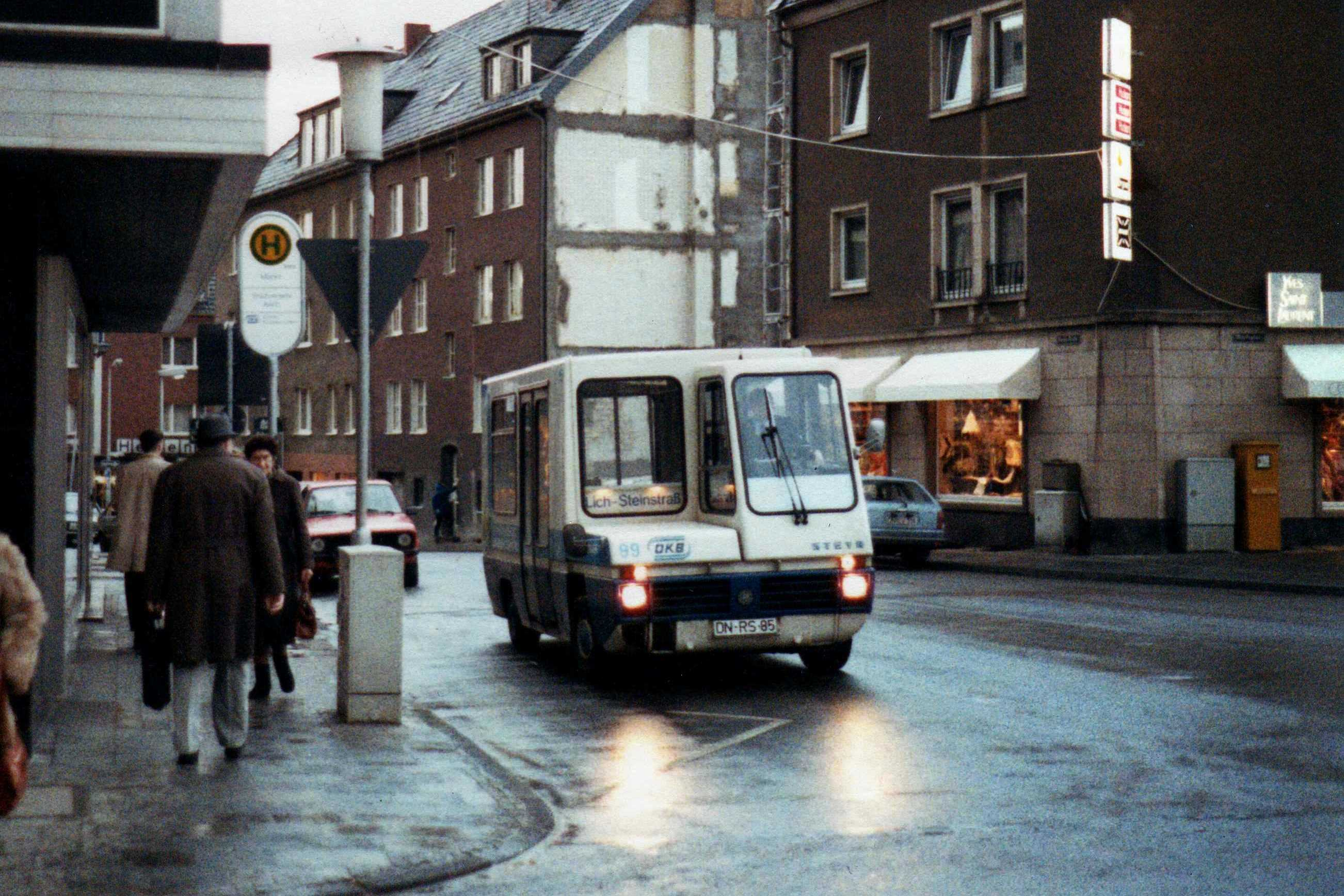 City-Bus der Dürener Kreisbahn (DKB) auf Rundkurs durch die Jülicher Innenstadt, aus der Kleinen Rurstraße kommend an der eigens hierzu eingerichteten Haltestelle Markt am Freitag, den 19. Dezember 1986